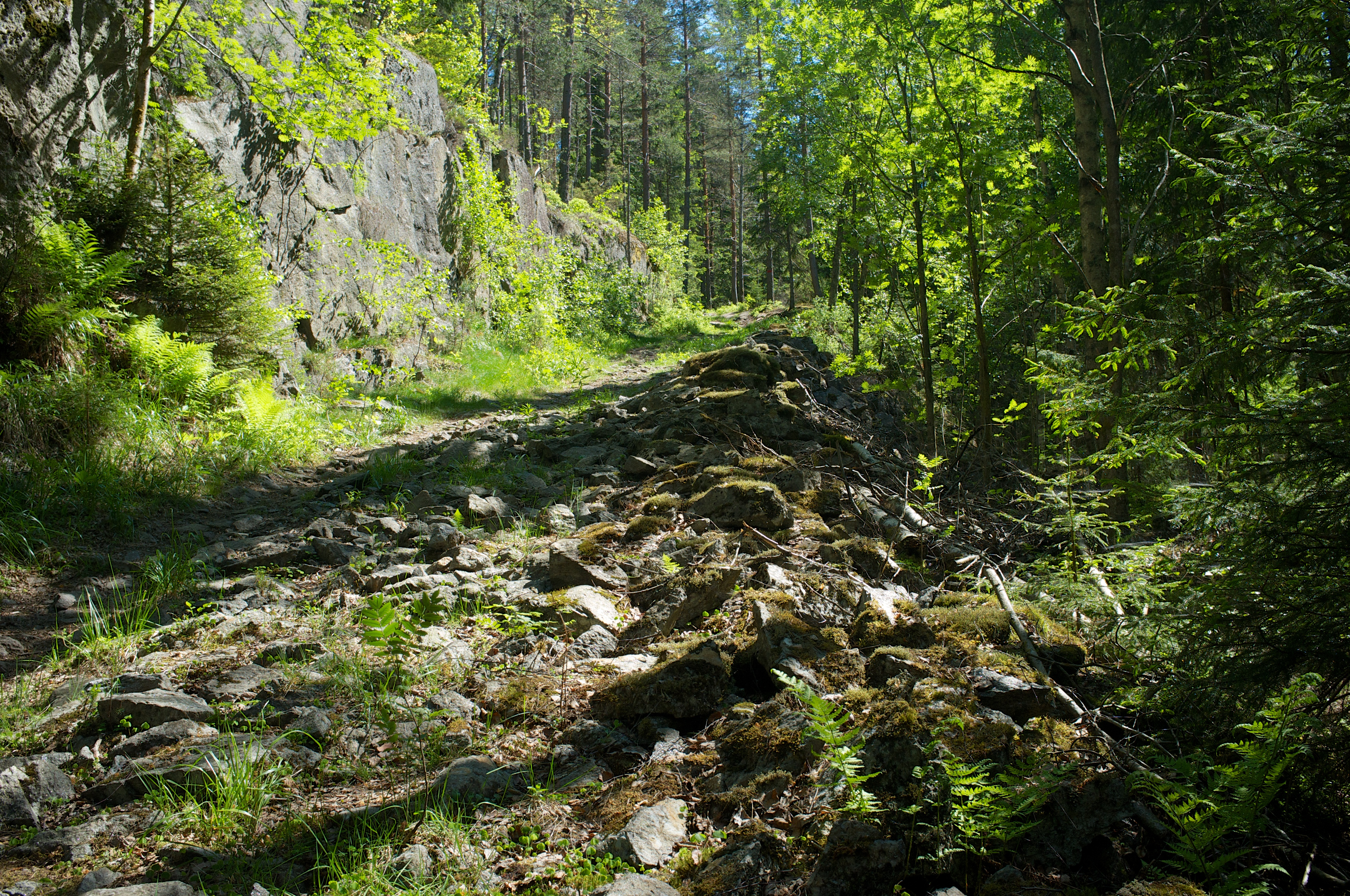 Cudriobakken i Østmarka i Oslo.